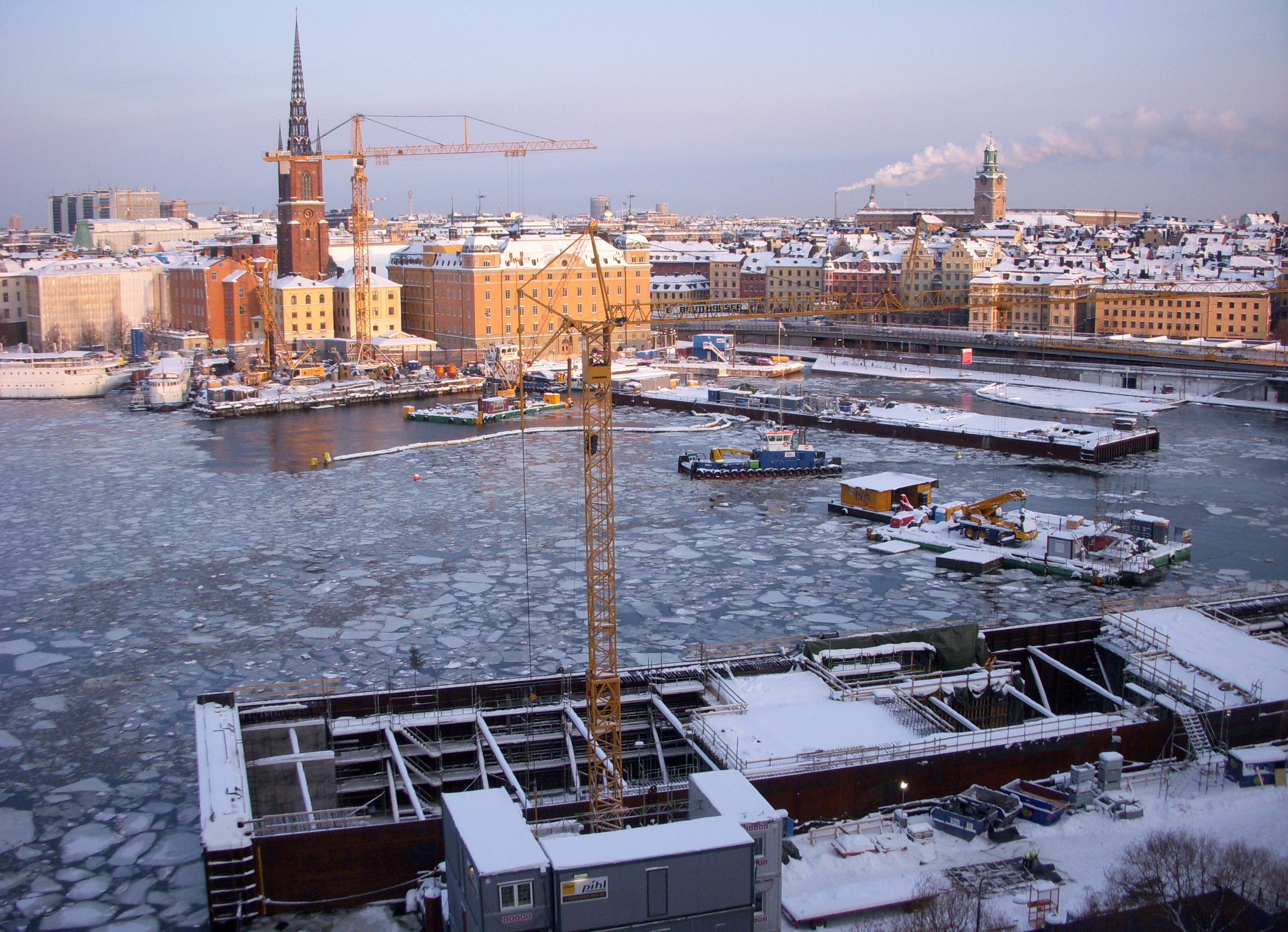 Byggarbeten med Söderströmstunneln i Stockholm, 2010-12-21